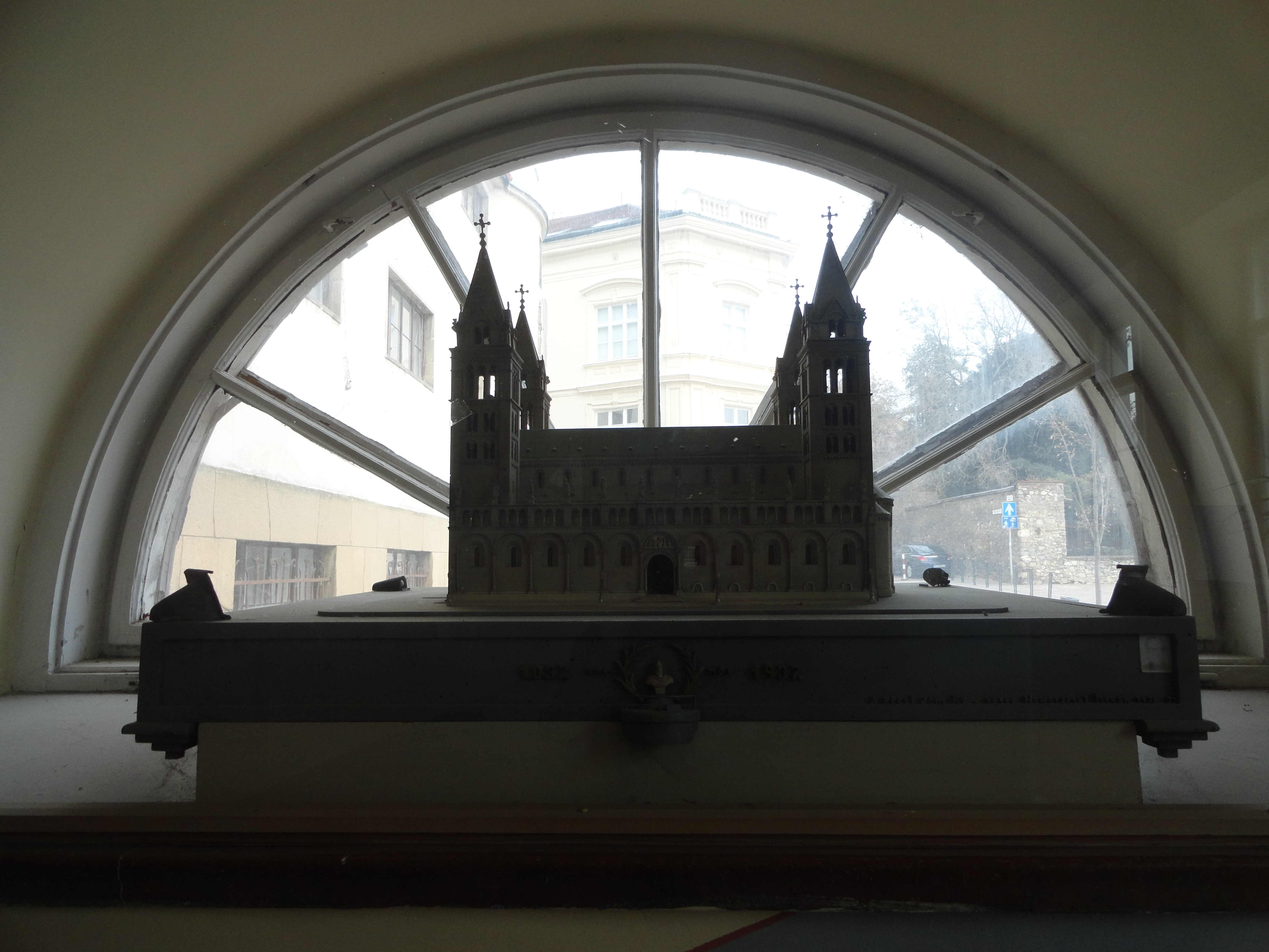 A Ciszterci Rend Nagy Lajos Gimnáziumában található pécsi bazilika és székesegyház modellje. Készült: 1937?